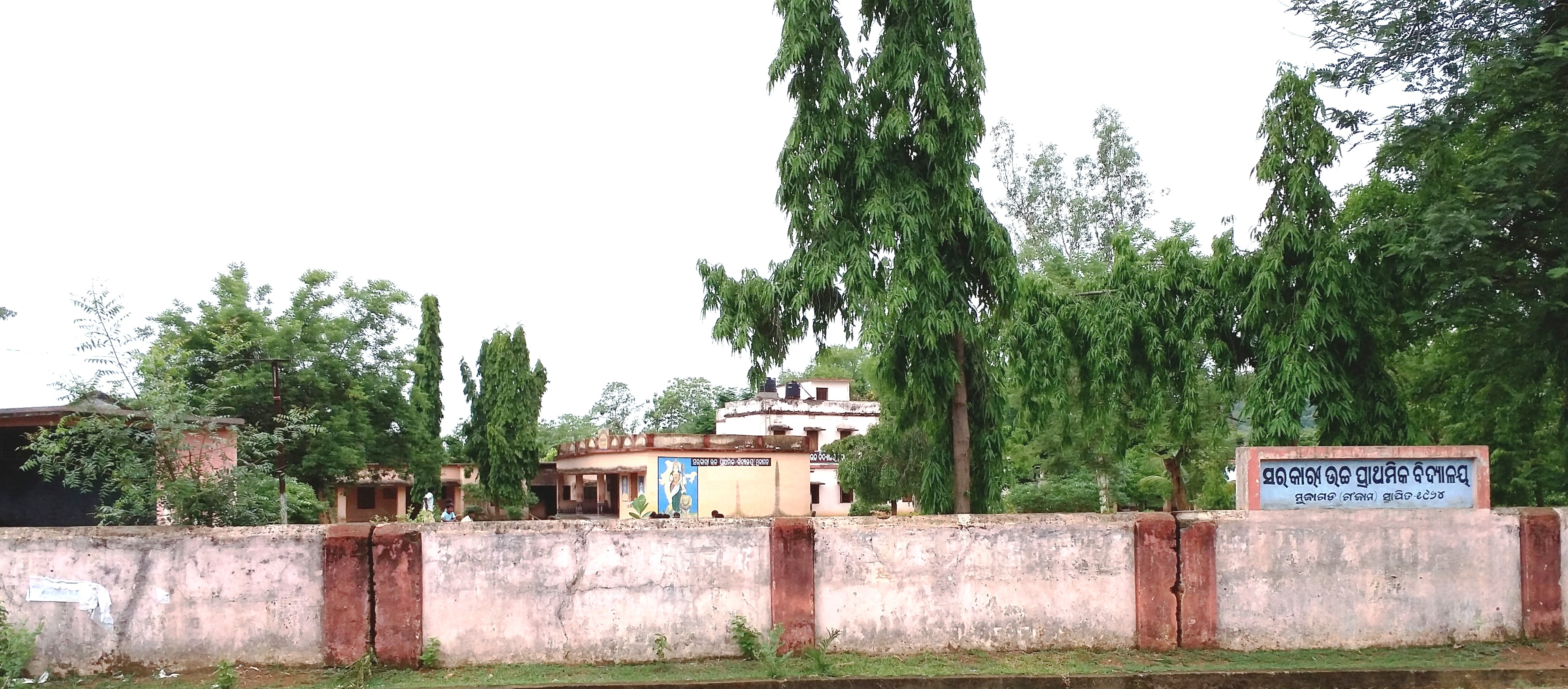 U.P.School at Mujagada, Ganjam.